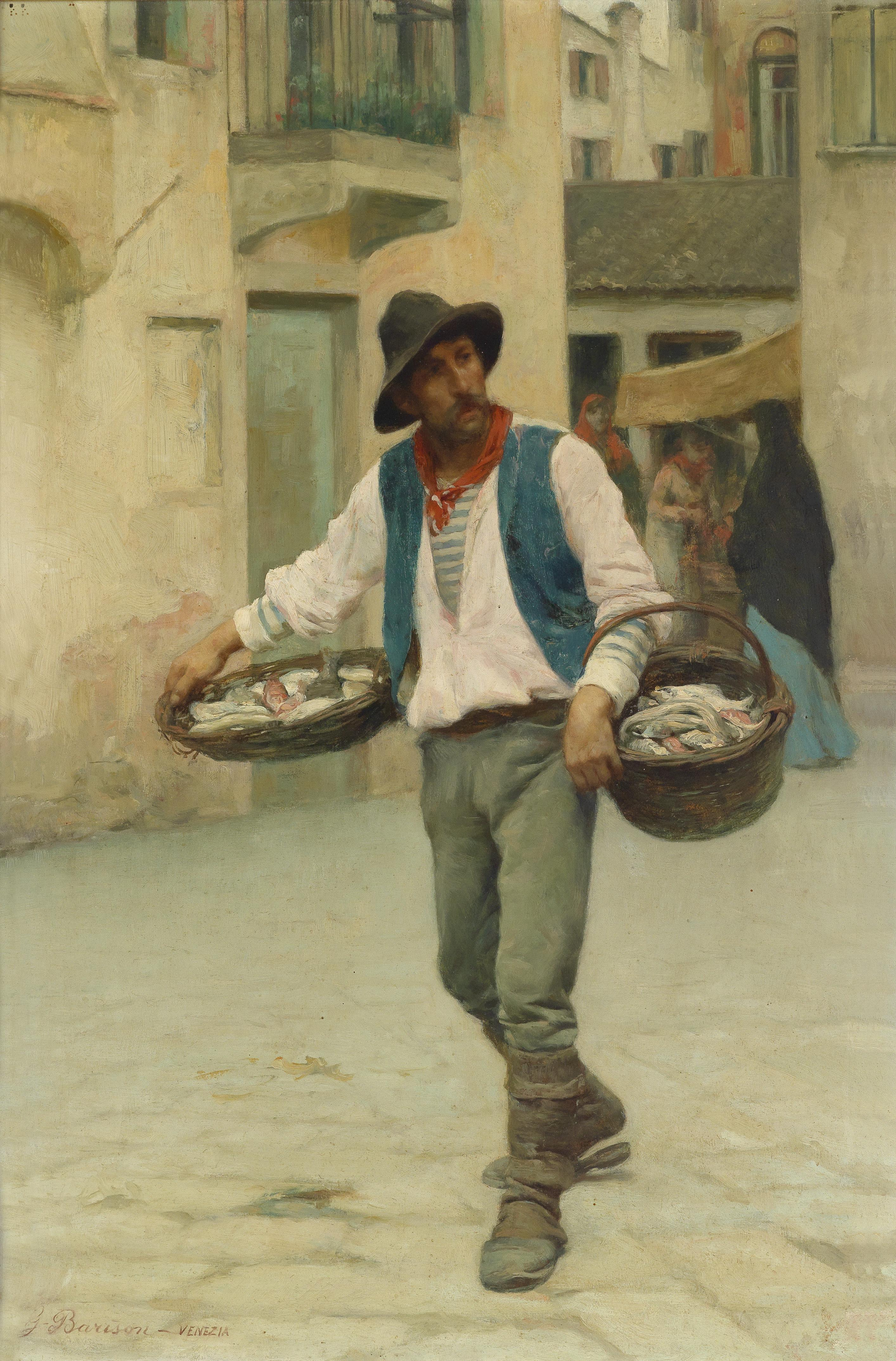 Venezianischer Fischverkäufer, signiert G. Barison, Venezia, Öl auf Holz, 38,5 x 25,5 cm